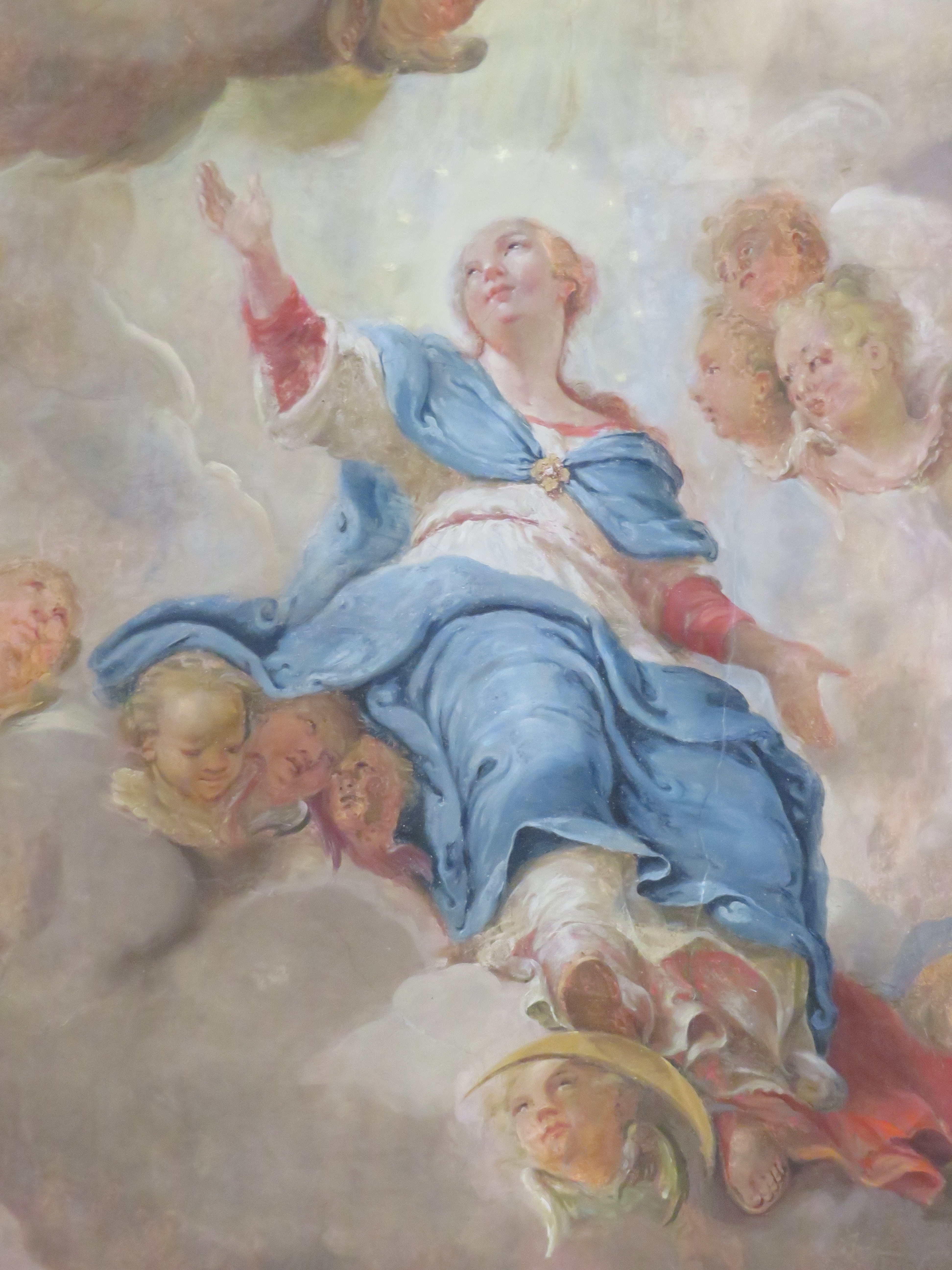 Kath. Pfarrkirche St. Martin Unterkirchberg